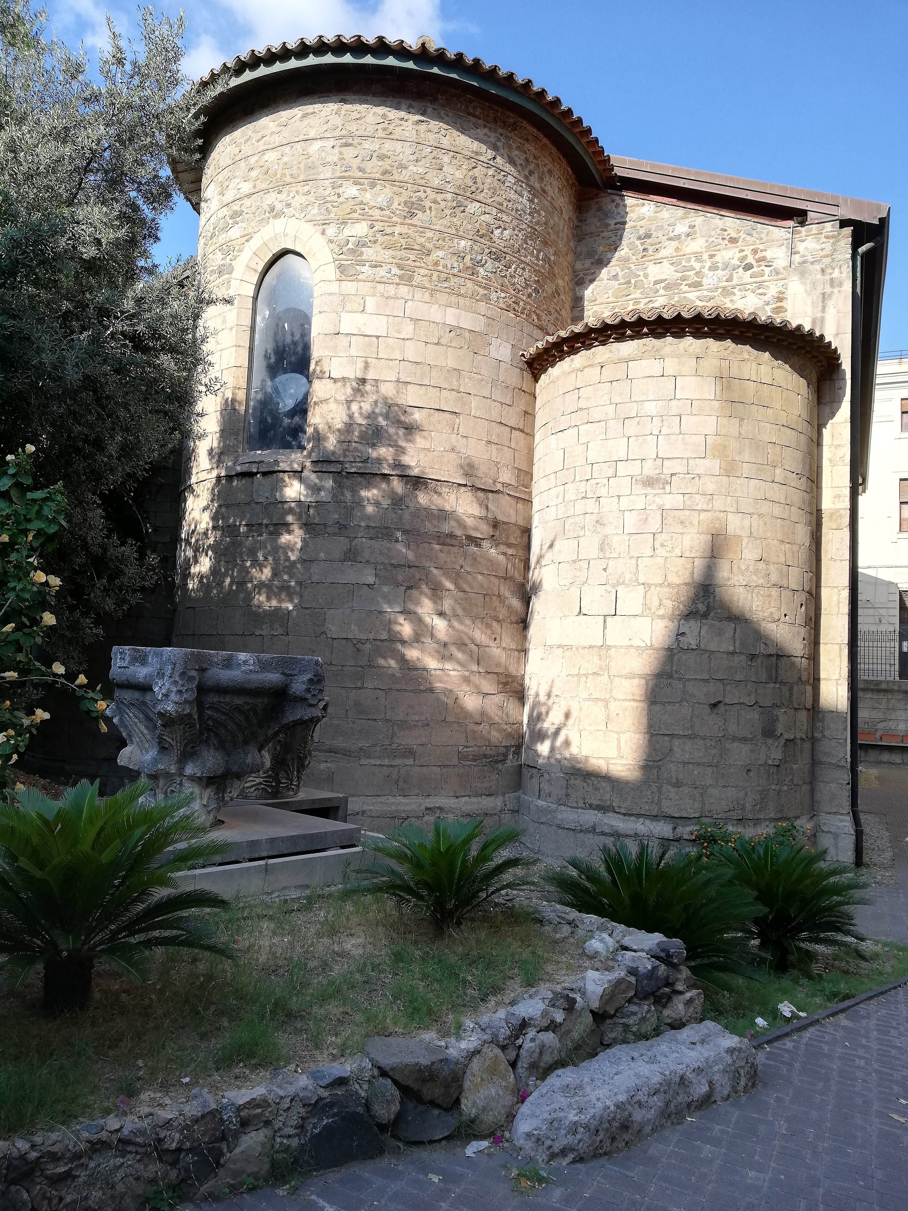 chiesa di Santa Maria Alemanna This is a photo of a monument which is part of cultural heritage of Italy.